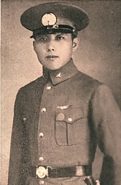 閻海文空軍少尉（1916年－1937年8月17日）